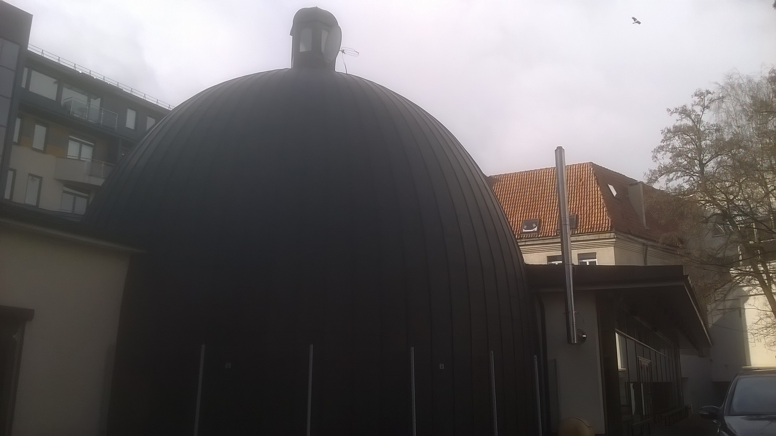 Здание старого вильнюсского планетария. Построено в 1961 году по проекту архитектора Йонаса Касперавичюса, адрес: ул. Й. Басанавичюса, 4. После постройки в 1989 году нового вильнюсского планетария старый планетарий не функционирует.